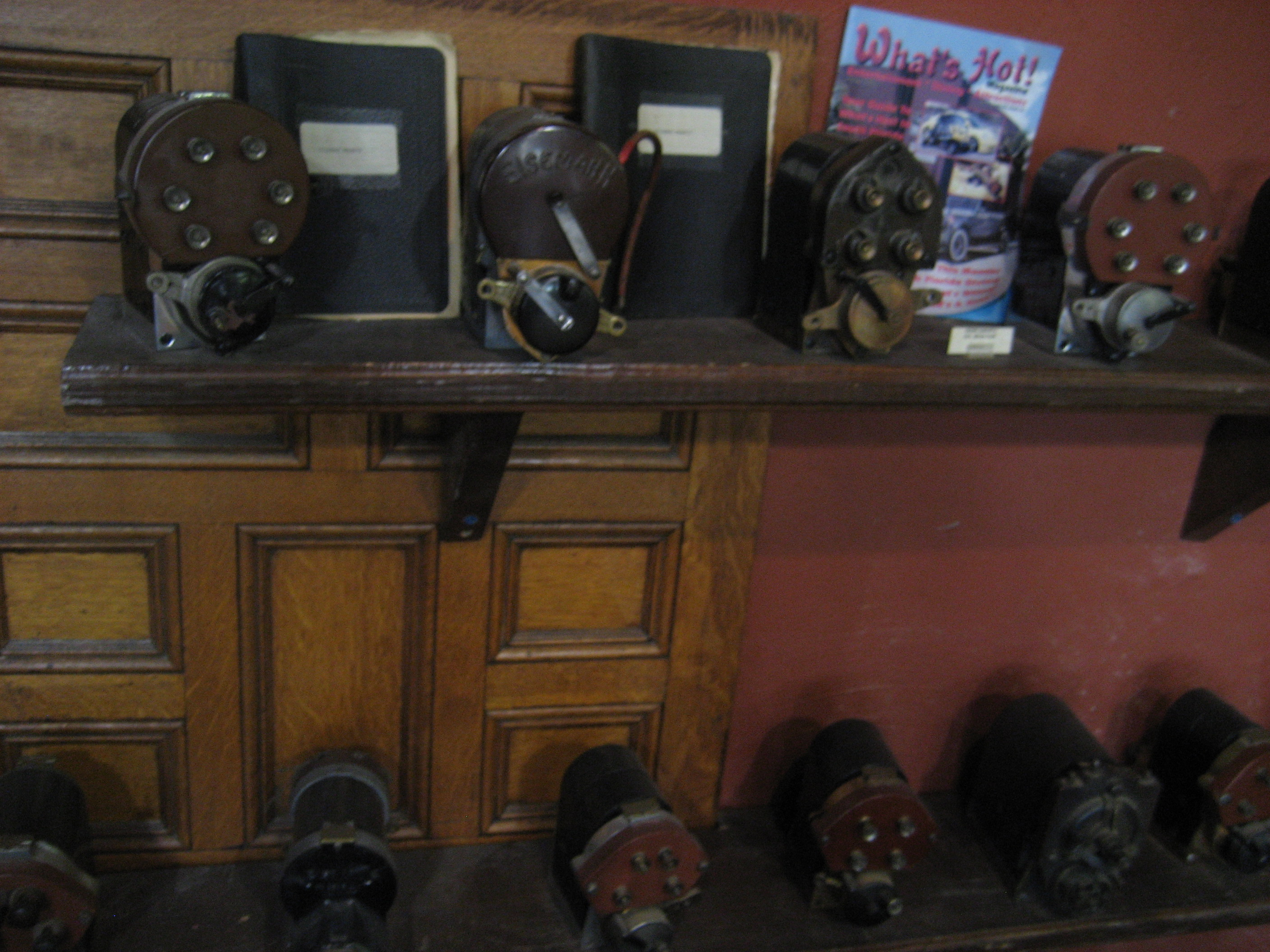 Fort Lauderdale Antique Car Museum. Display of period magnetos.